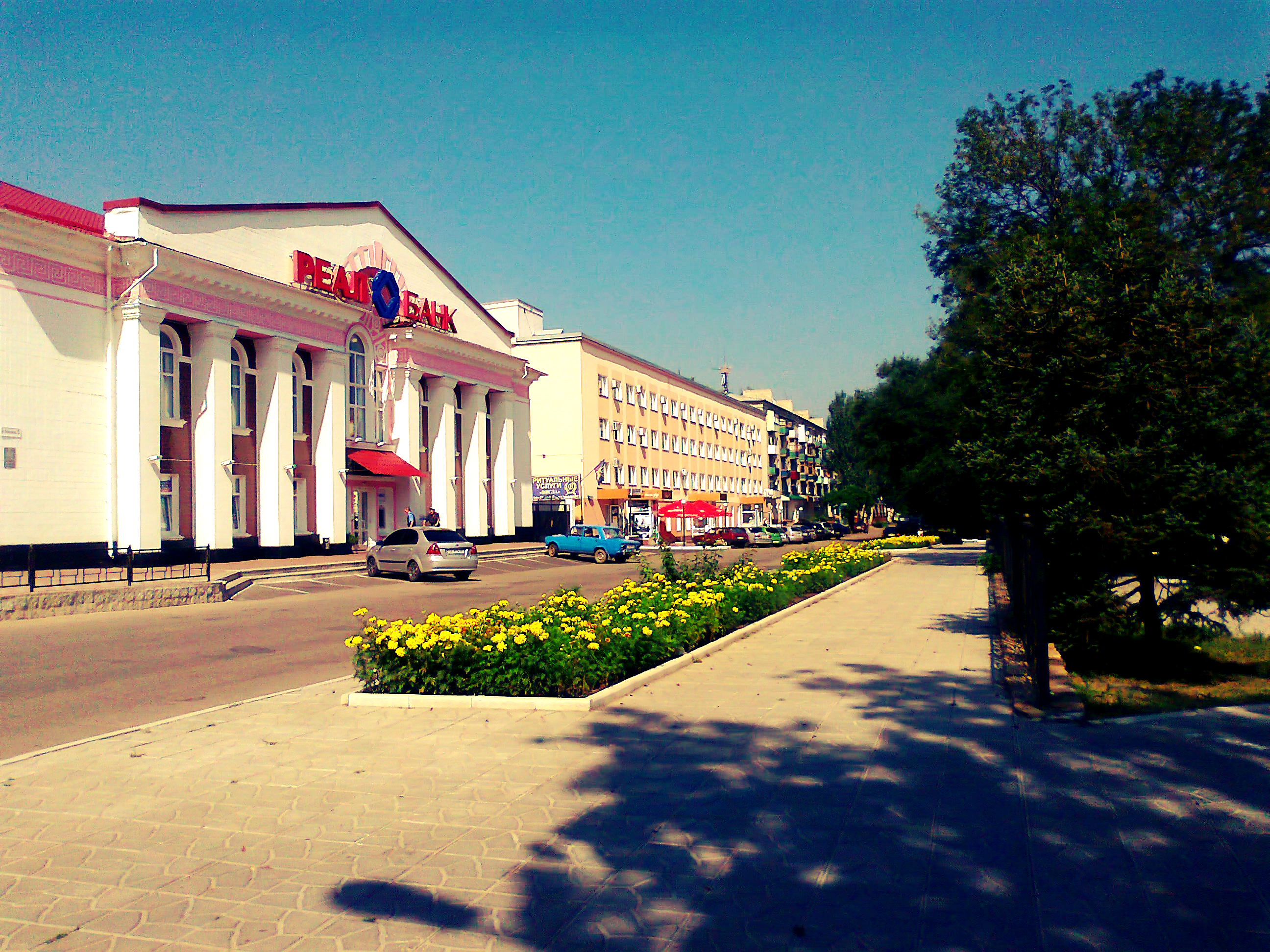 Voroshylova Street